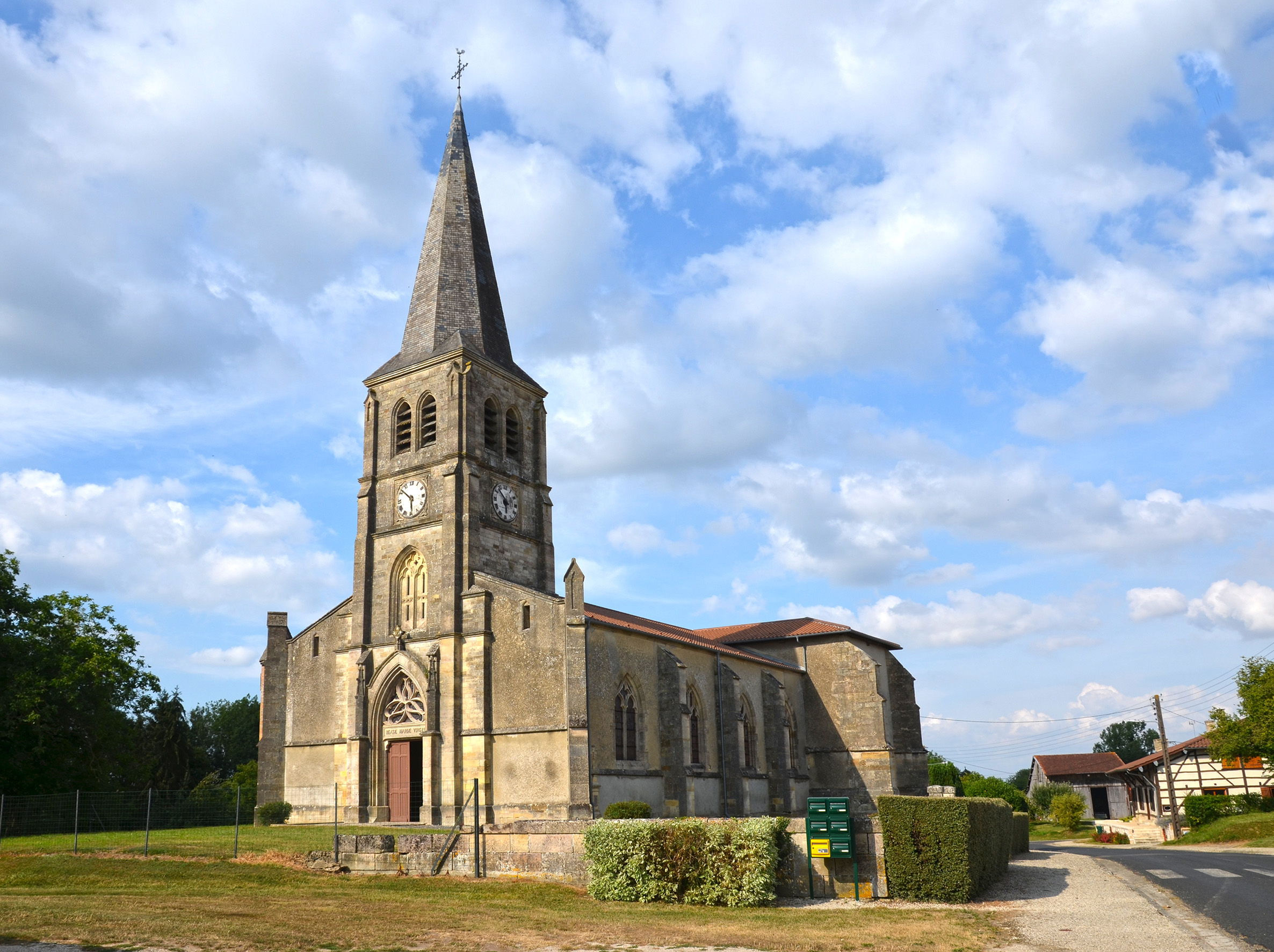 Eglise des Charmontois